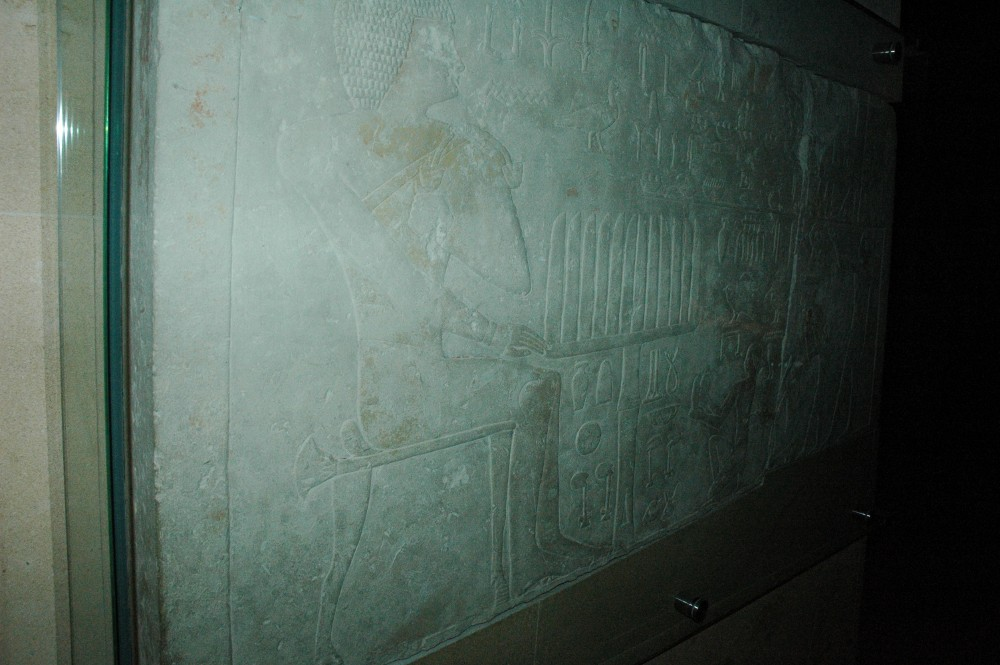 Die Kultkammer des Ka-ni-nisut im Kunsthistorischen Museum Wien von der Mastaba des Ka-ni-nisut aus Giza, Grabung Hermann Junker 1913. Nördliche Türleibung. Inv.Nr. 8006